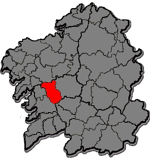 Mapa coa localización da Comarca de Tabeirós - Terra de Montes.